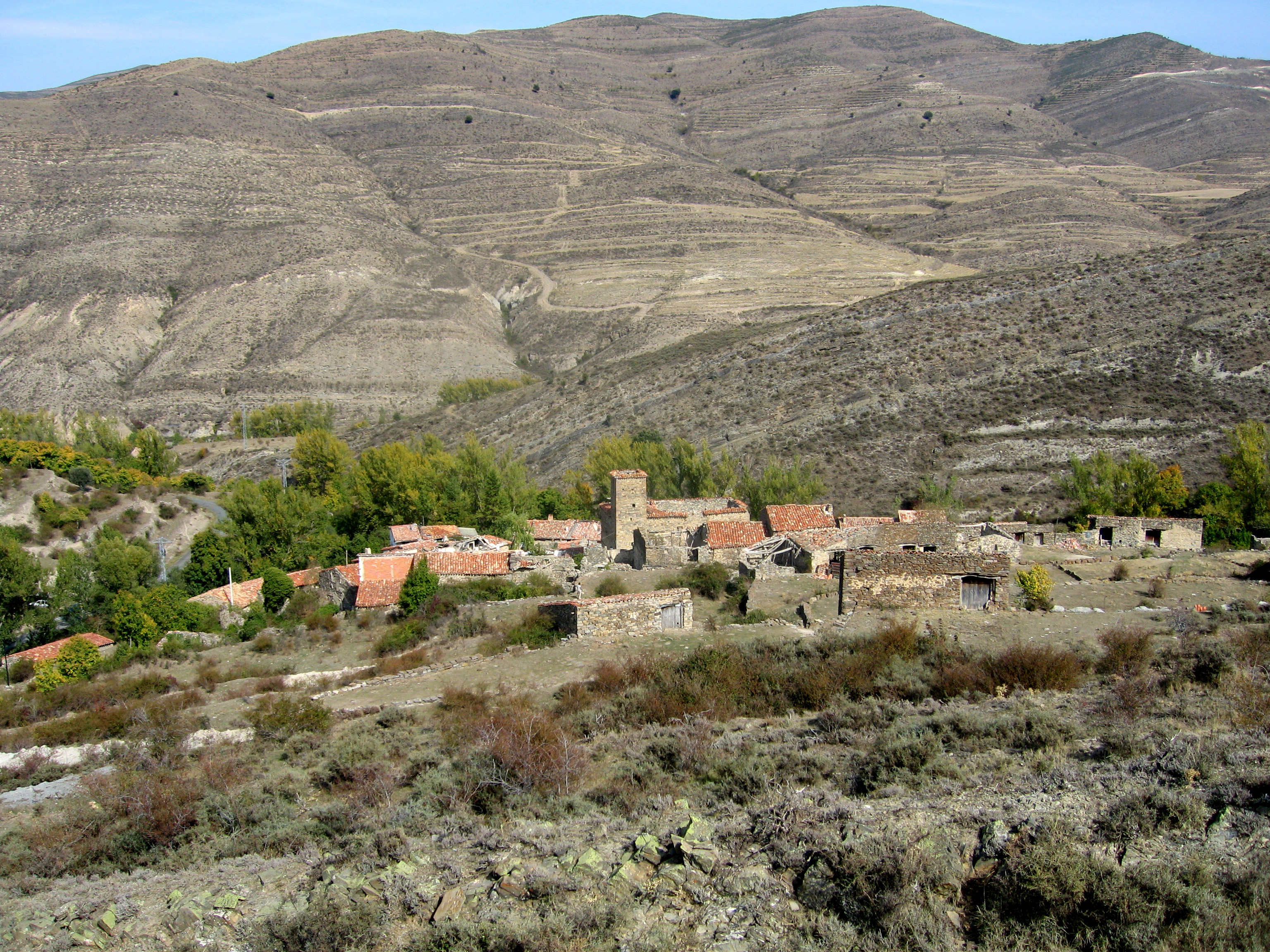 Poyales, aldea de Enciso, La Rioja - España.